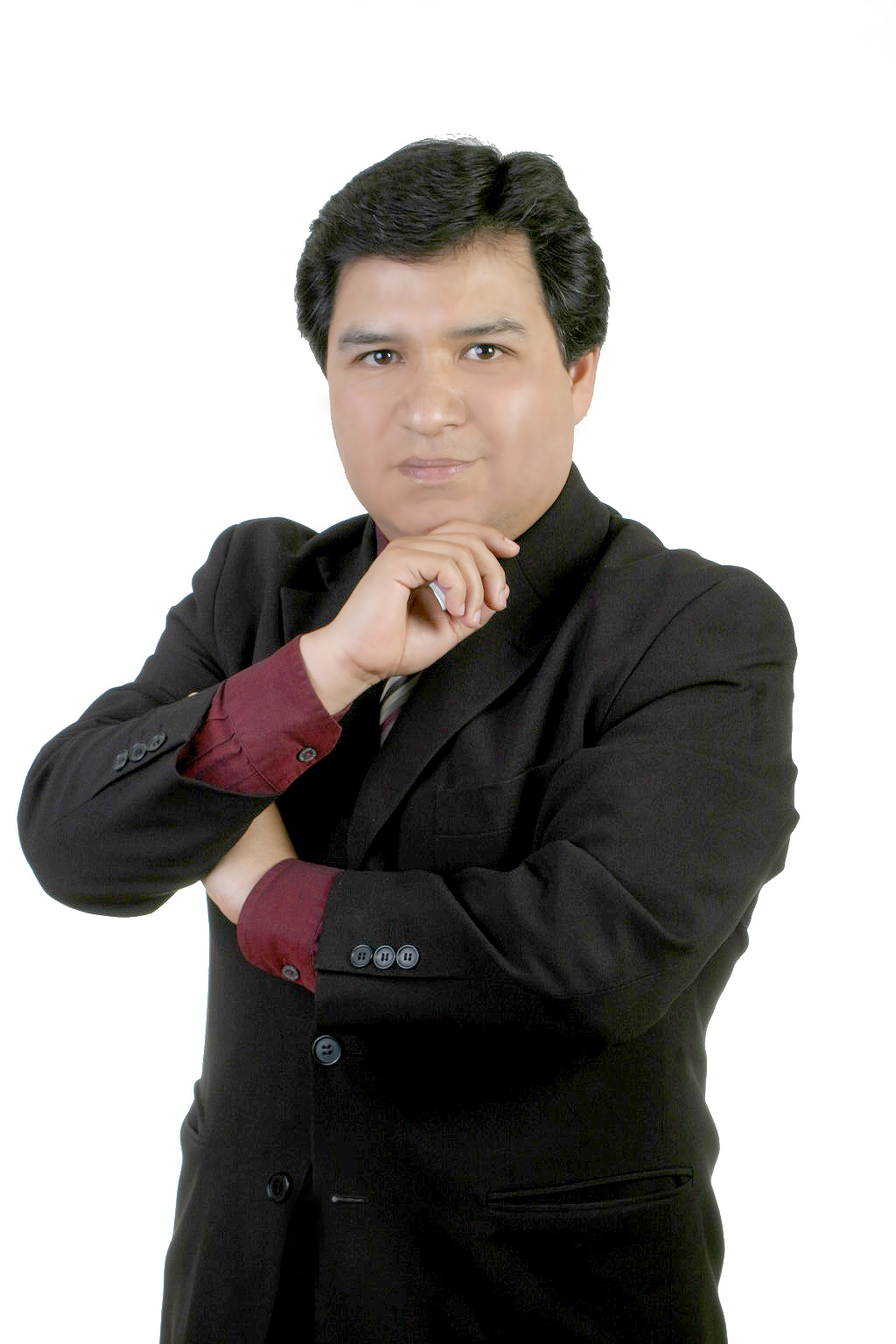 Portrait des mexikanisch-deutschen Tenors Omar Garrido